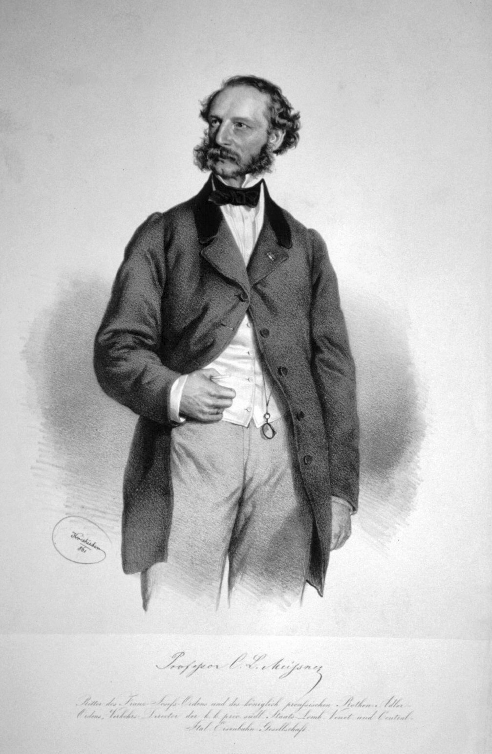 Karl Ludwig von Meissner (1809-1868), österreichischer Eisenbahnpionier. Lithographie von Josef Kriehuber, 1861